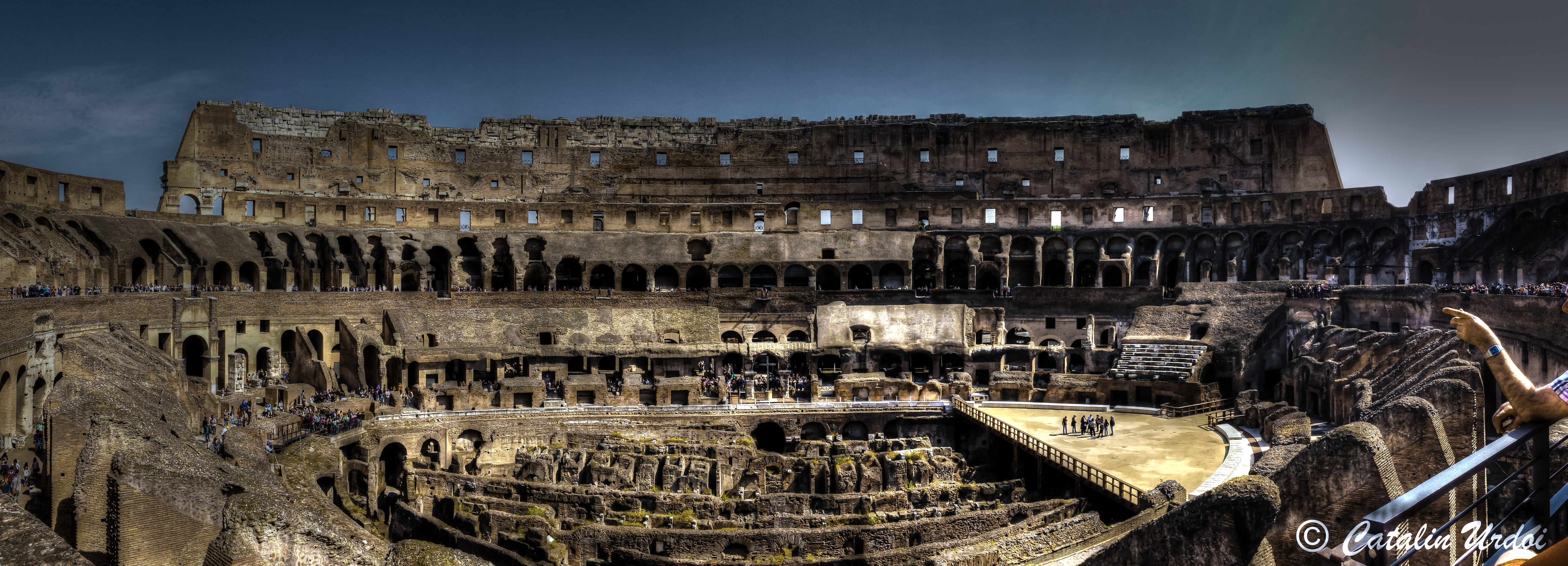 panorama interioara